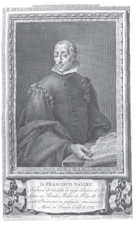 Retrato de Francisco Vallés.